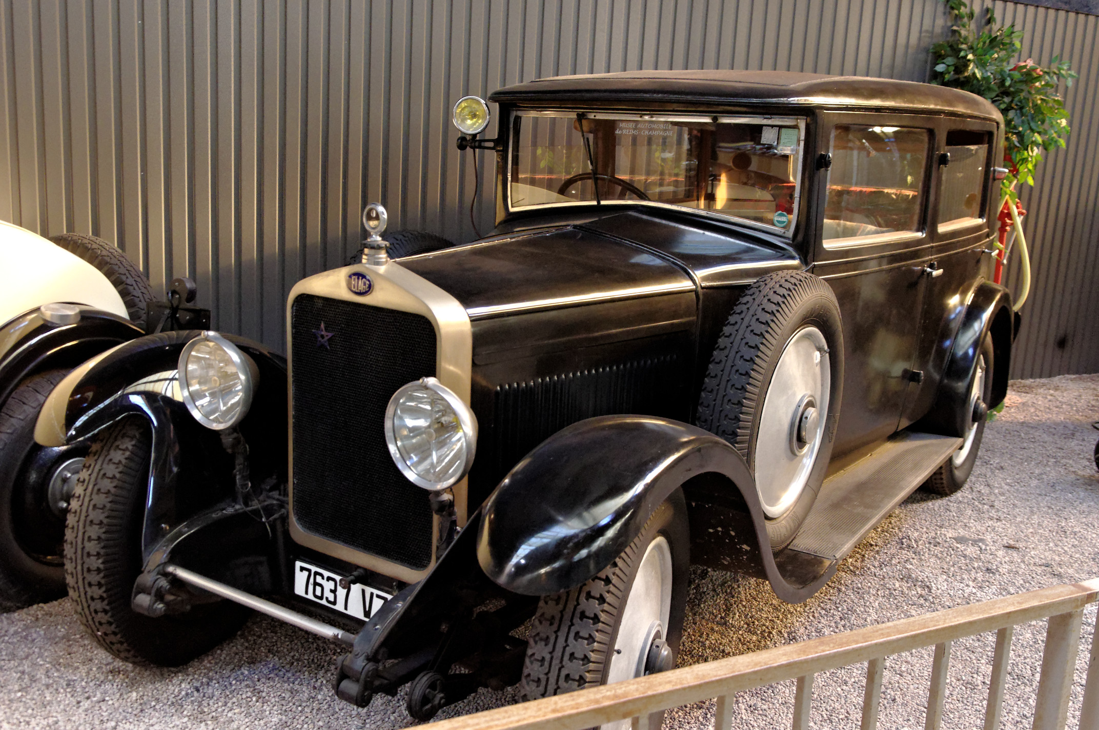 Delage DR 70 (1929), Berline 4 portes, 6 cyl. en ligne, 2516 cm3, 14 cv fiscaux, vitesse max. 125 km/h (Musée Automobile Reims Champagne, Reims, Marne, France)